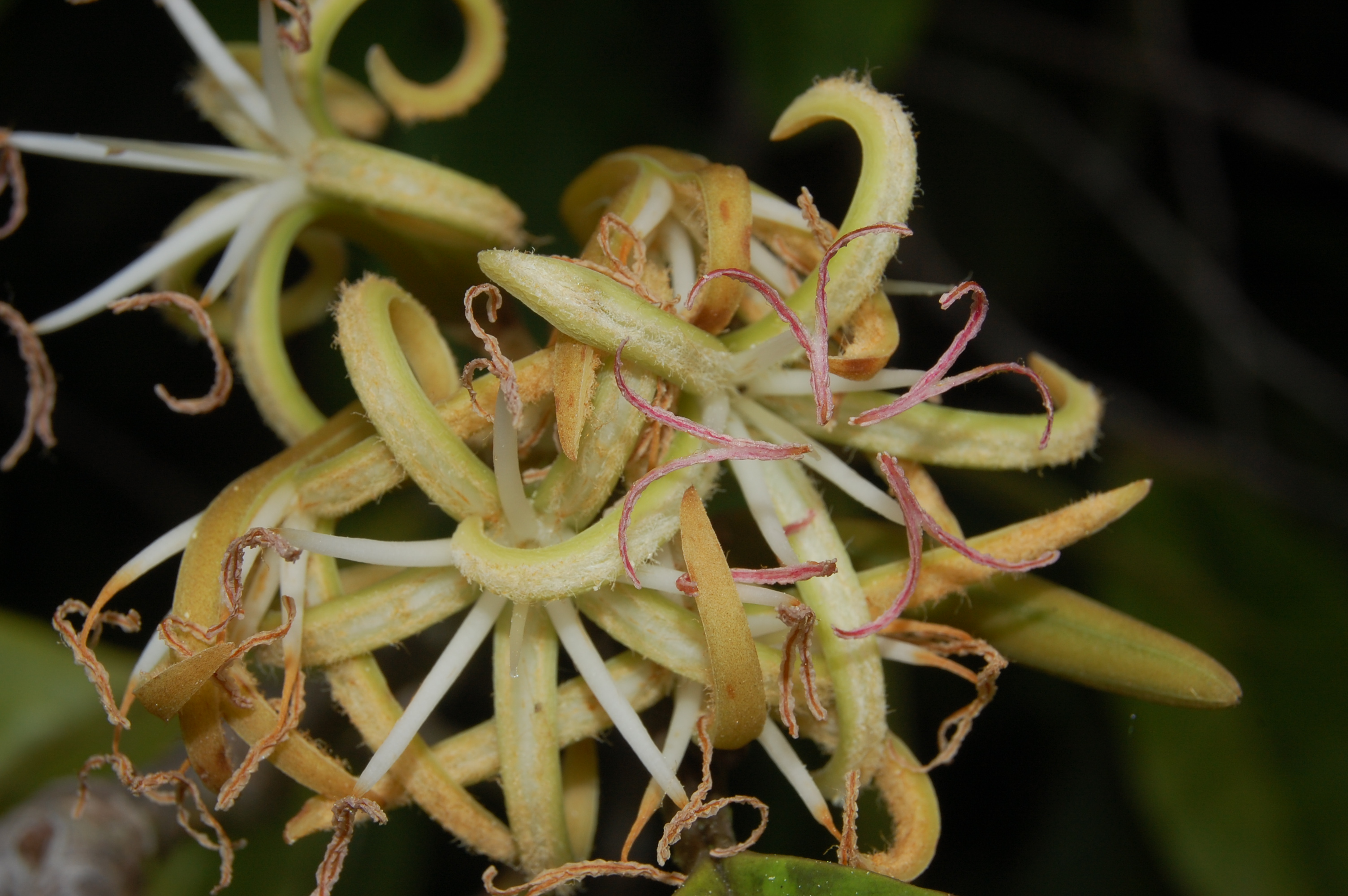 Manual de Plantas de Costa Rica: Testigo Hammel et al. 24665